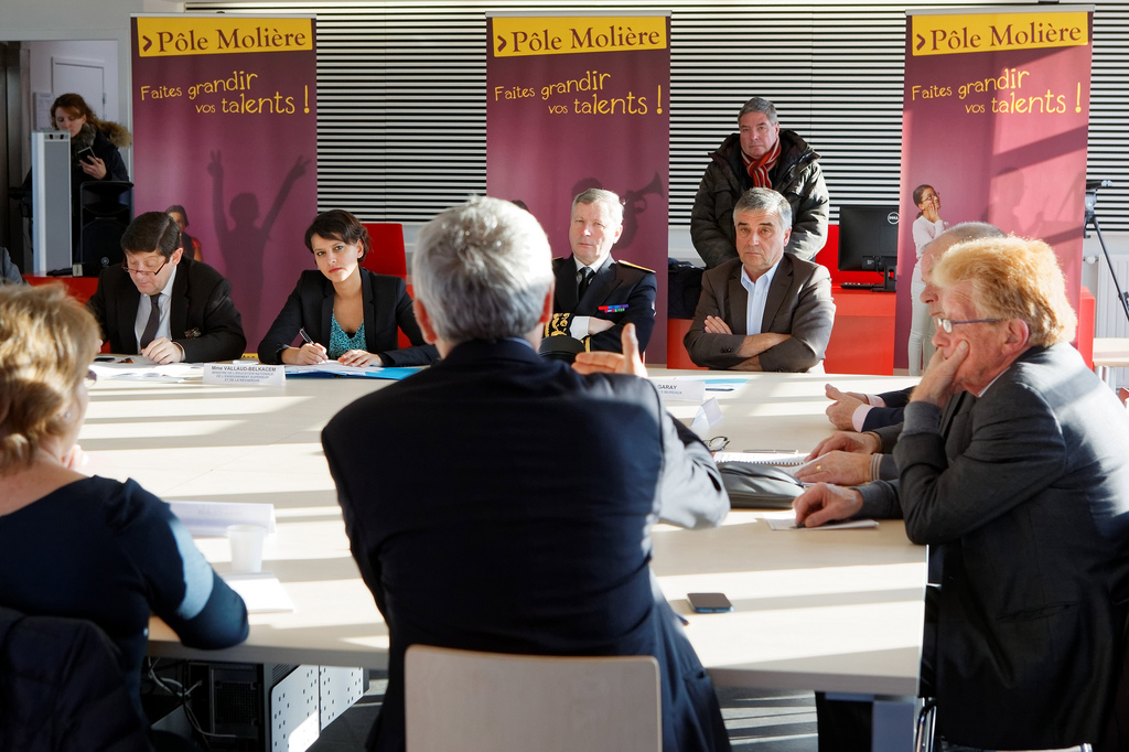 Table ronde lors de l'inauguration du Pôle Molière - Février 2015